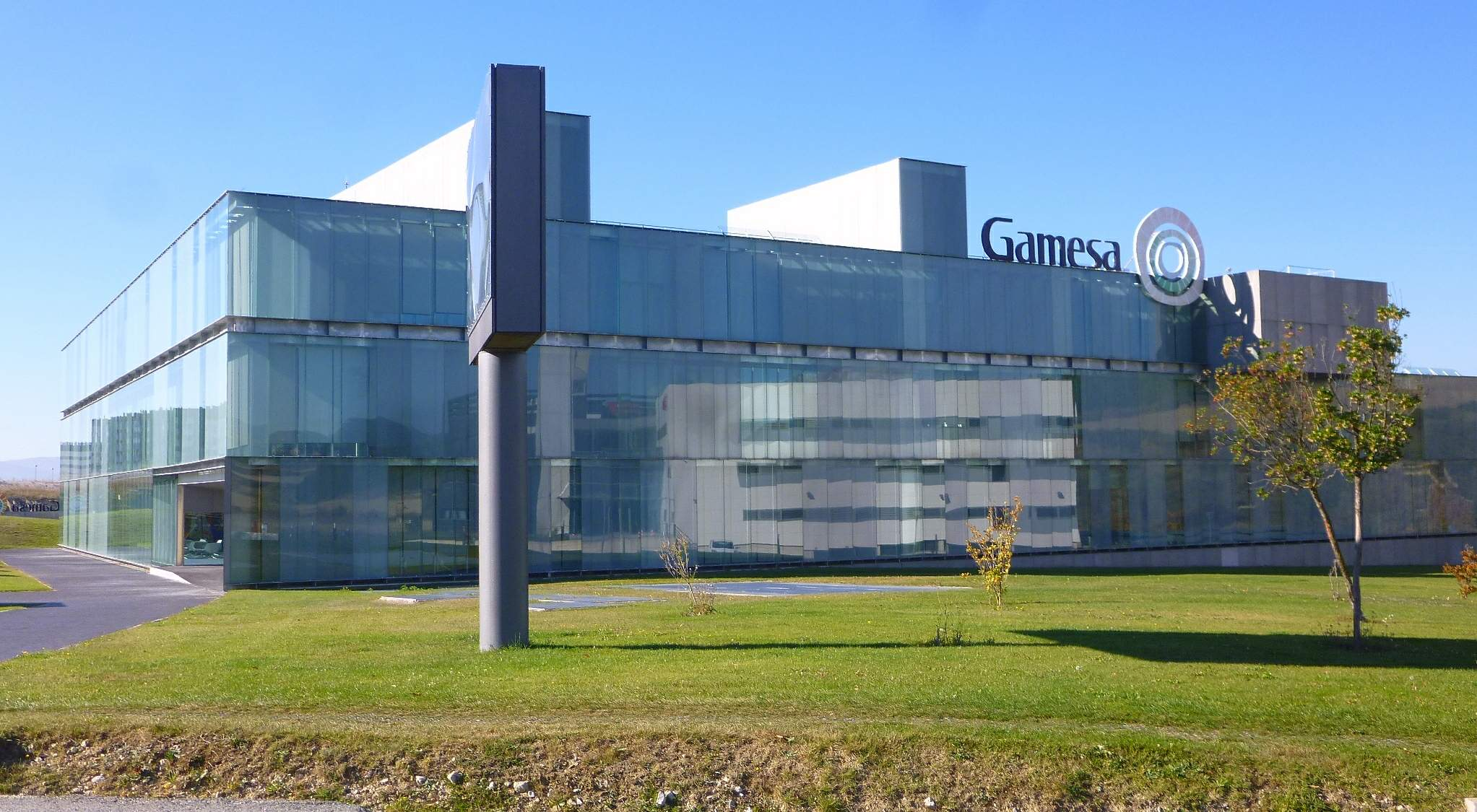 Sarriguren (Egüés) - Parque de la Innovación de Navarra-Enclave Energía y Medio Ambiente, Edificio Gamesa I